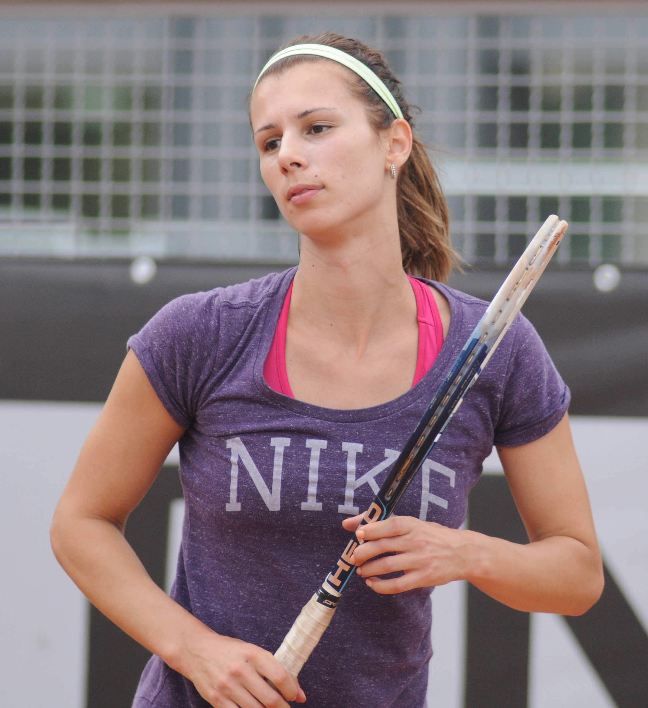 Tsvetana Pironkova at the 2014 Internazionali BNL d'Italia